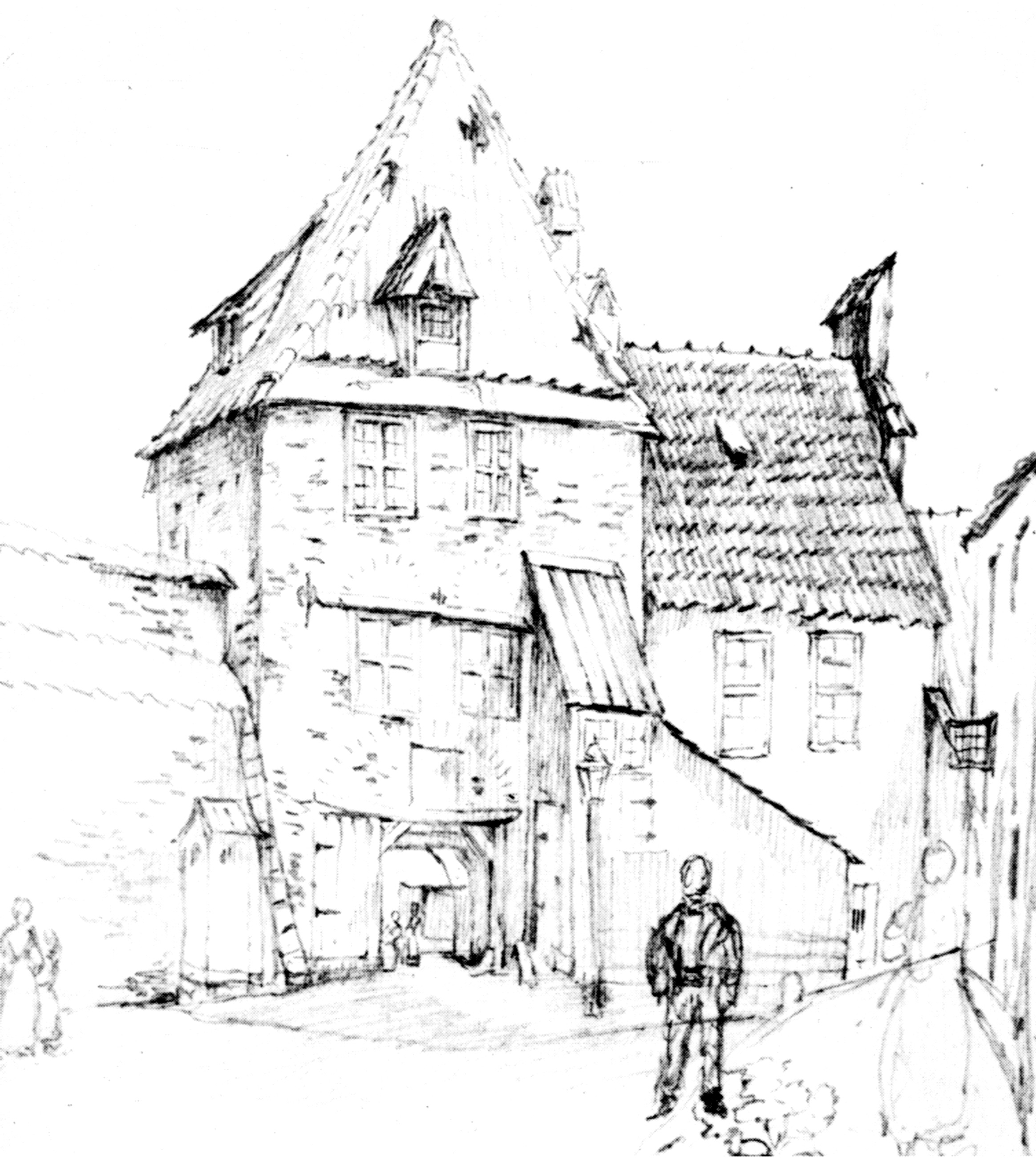 Der Glockengießerturm in Lübeck